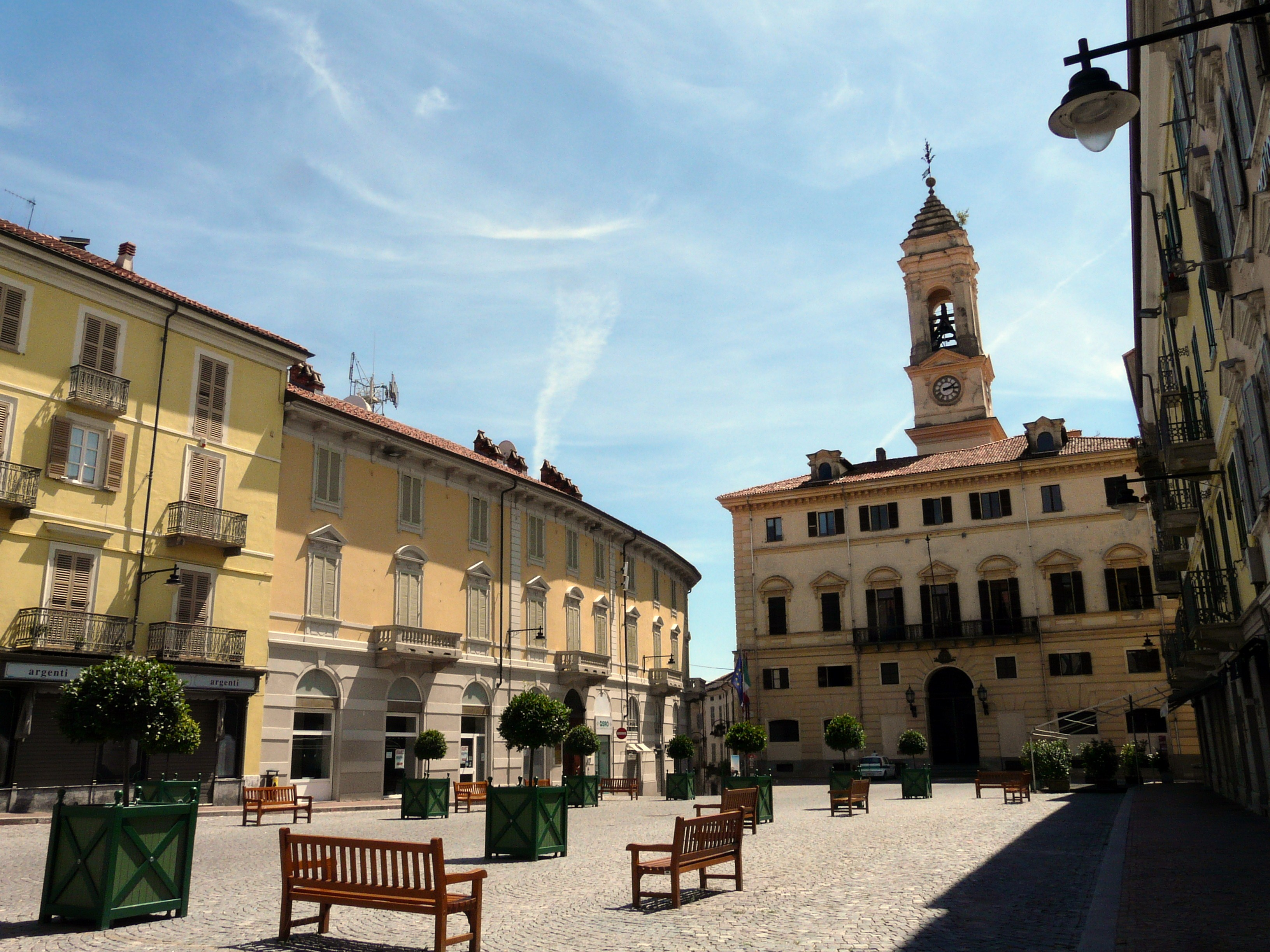 Piazza Ferruccio Nazionale, Ivrea, Piemonte, Italia